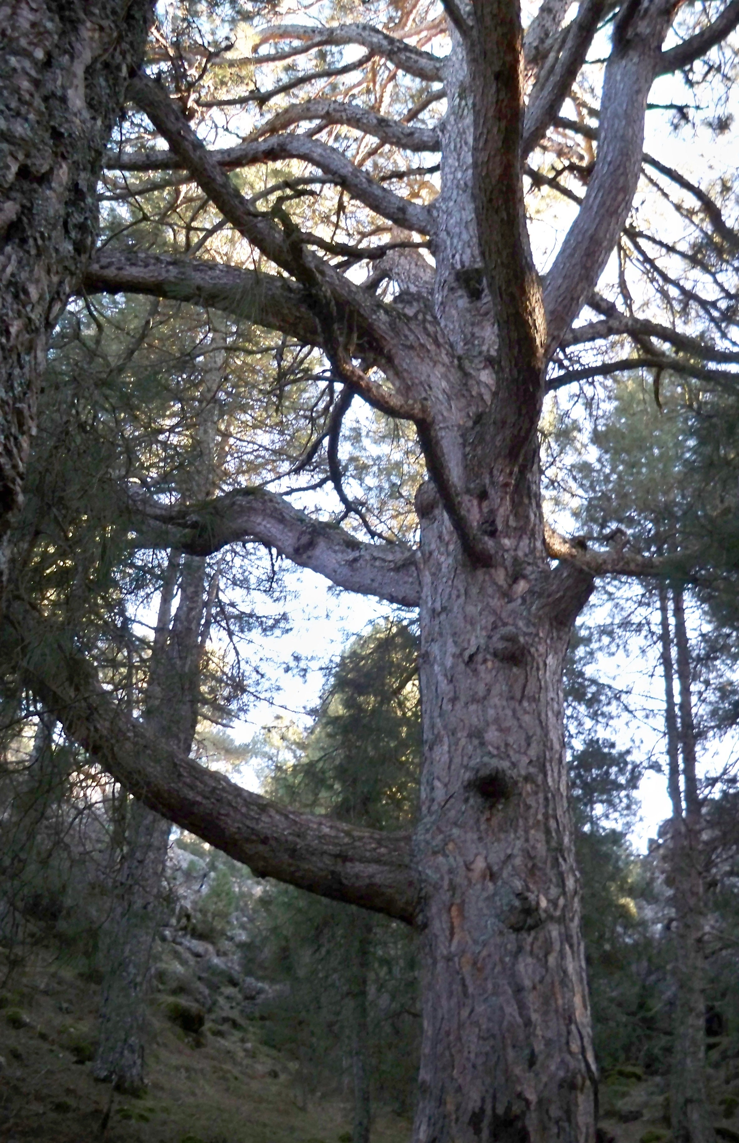 Pino del Toril, impresionante ejemplar de pino laricio situado cerca de la localidad de Cañada del Provencio, perteneciente al municipio de Molinicos (Albacete-España)